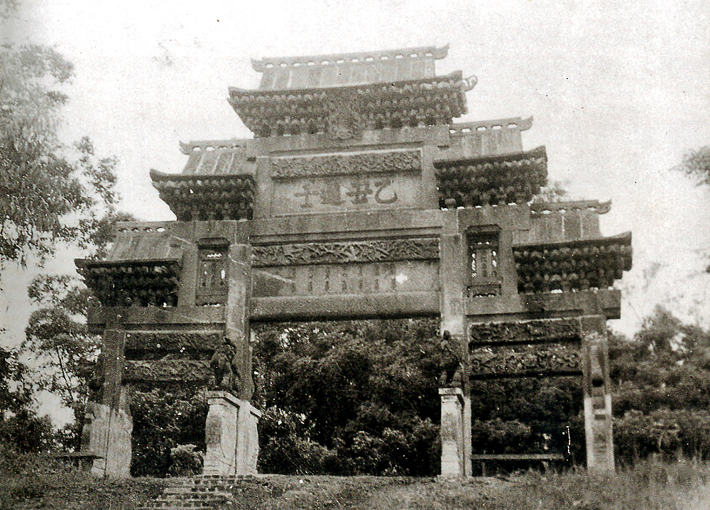 中華中路四牌樓中的乙丑進士坊，已移動至廣州私立嶺南大學（現中山大學）。